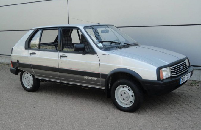 1986 Citroën Visa Leader D (1769cc, 60 PS)